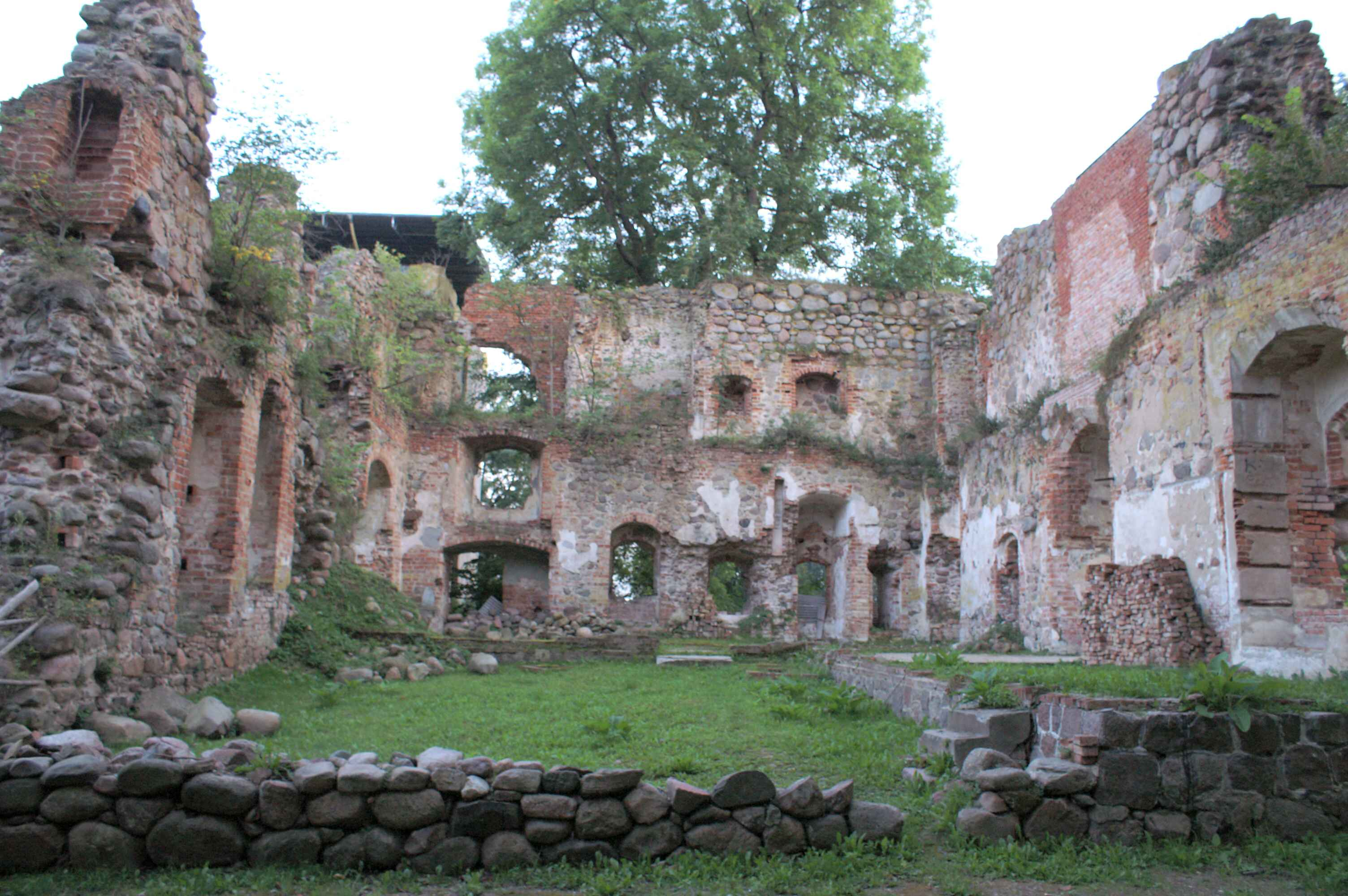 Putzar - Landkreis Ostvorpommern - Ulrichsbau - Südseite innen